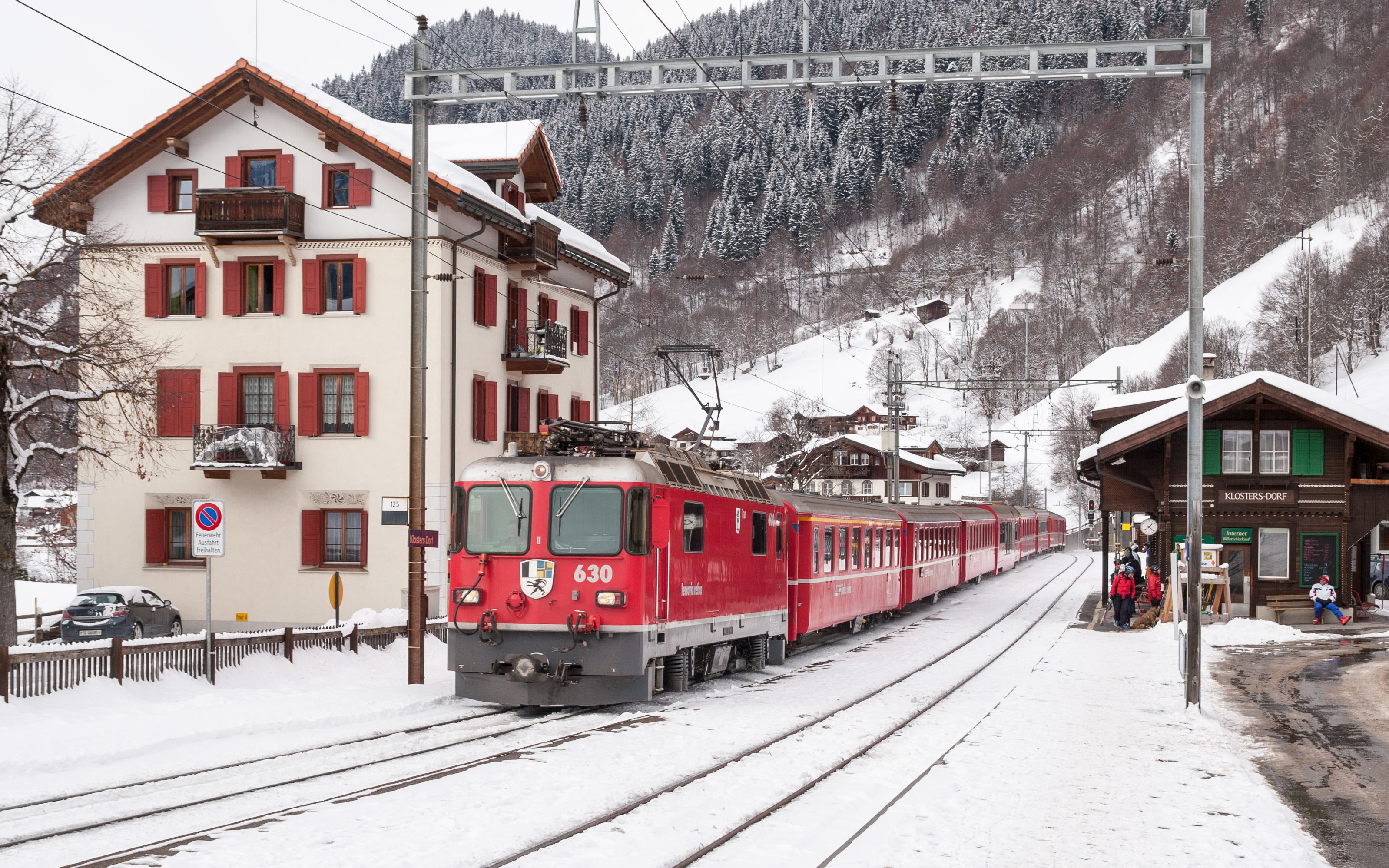 Ge 4/4 II N° 630 durchfährt mit einem Regionalzug den Bahnhof Klosters-Dorf (Jan. 2010)